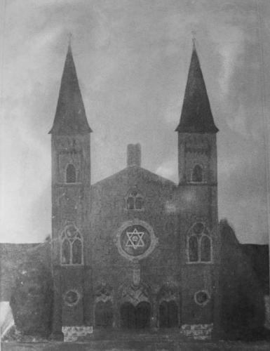 Alte Synagogein Hagen